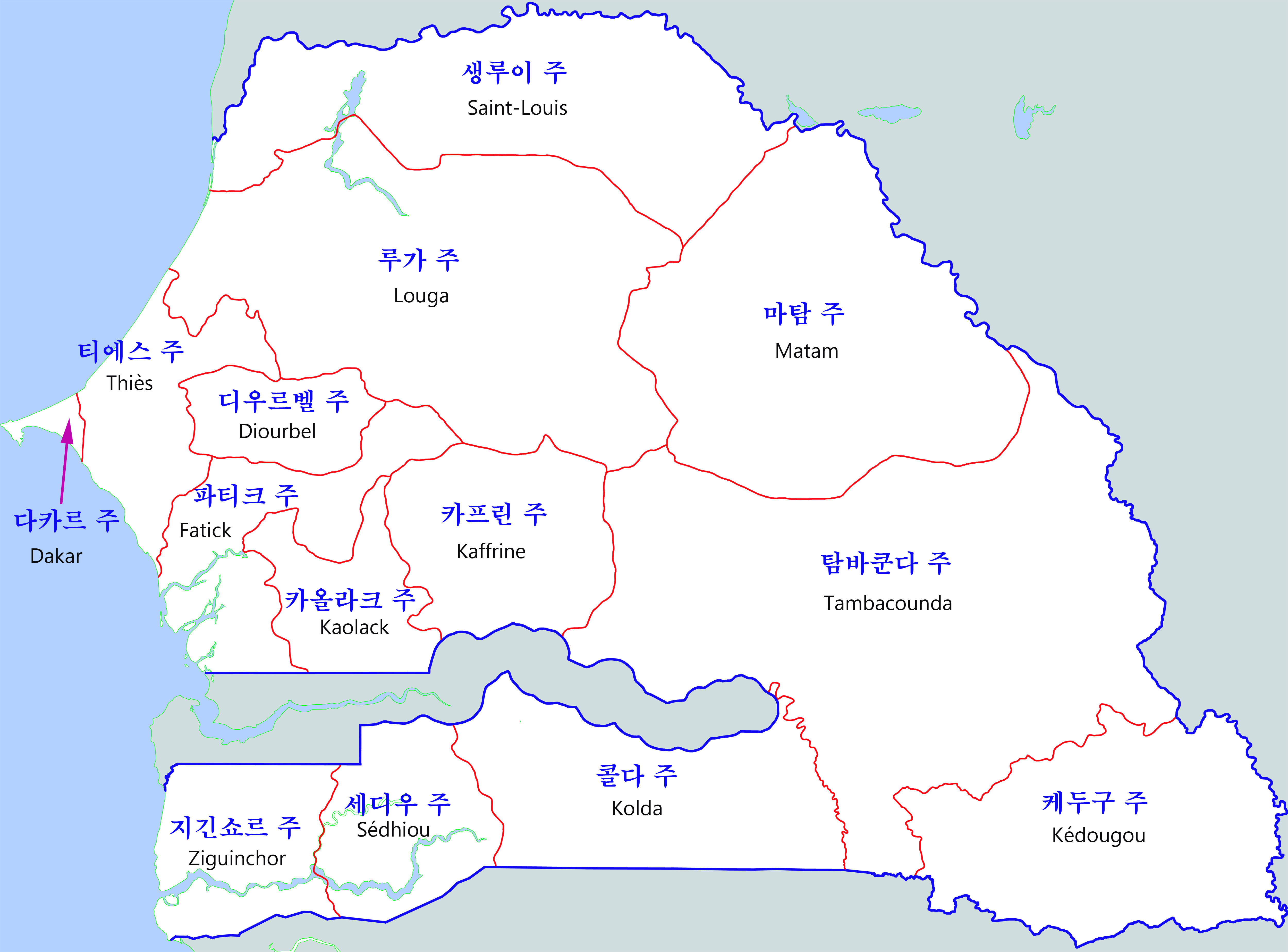 세네갈 행정구역